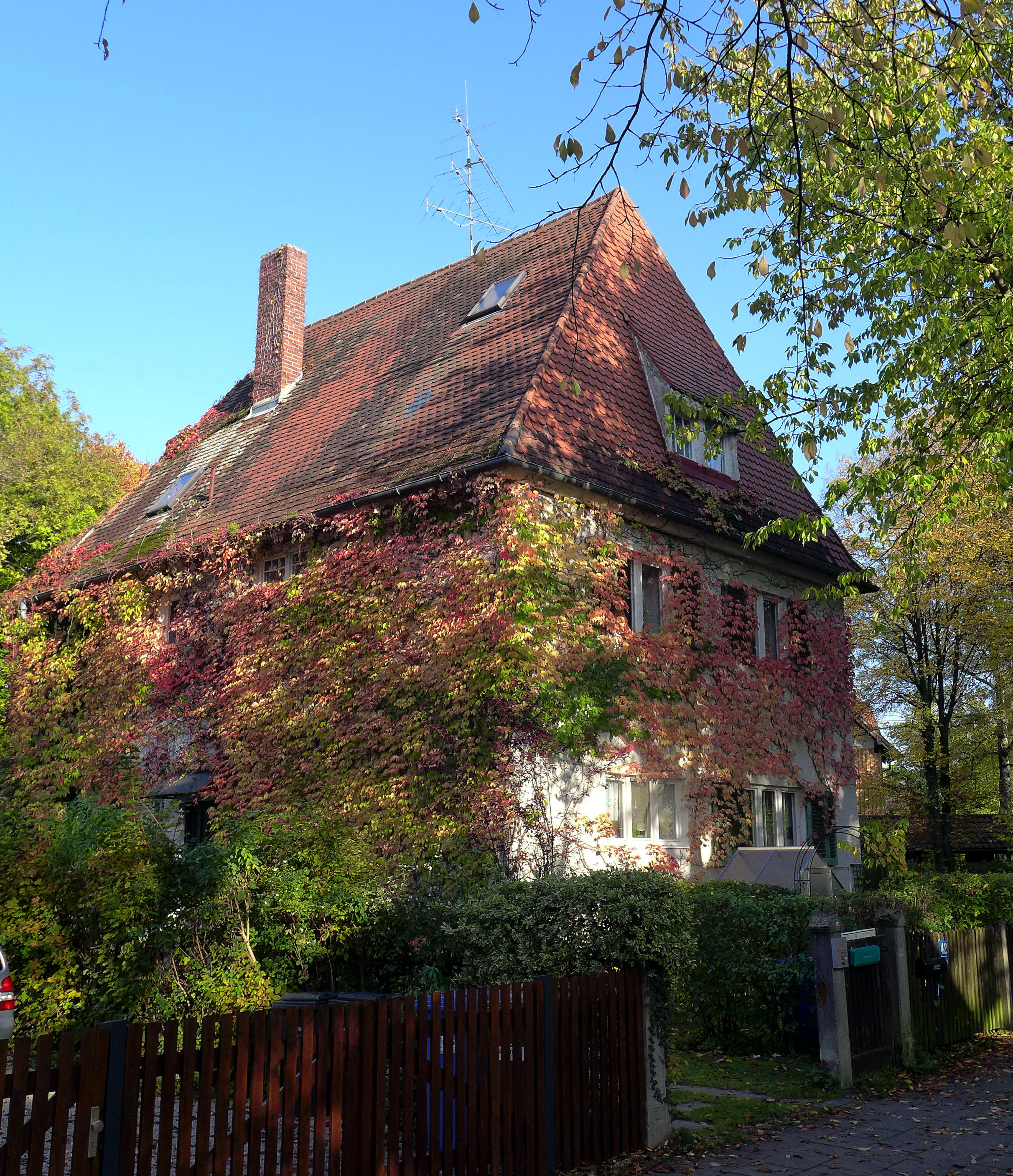 Marschnerstr 42, München